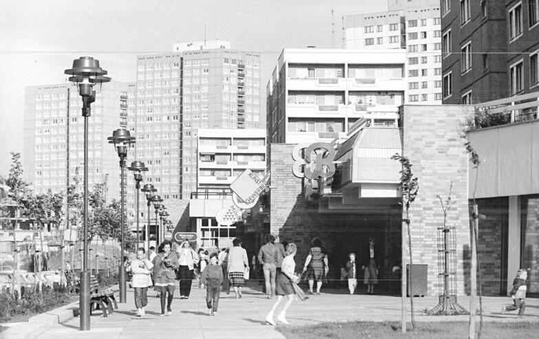 ADN-ZB Zimmermann 11.11.87 Berlin: Marzahner Ansichten Die Marzahner Promenade wird nach ihrer Fertigstellung gesellschaftlicher Mittelpunkt des Stadtbezirkes sein. Über 50 Geschäfte entstehen vor allem in den Erdgeschossen der Wohnhäuser. Auch Dienstleistungs- und Kultureinrichtungen fanden und finden hier ihren Platz. Charakteristisch für die rund zwei Kilometer lange Straße sind abgeschrägte Ecken, Kolonaden an den Häusern sowie helle und bunte Fassaden. siehe 14N, 15N